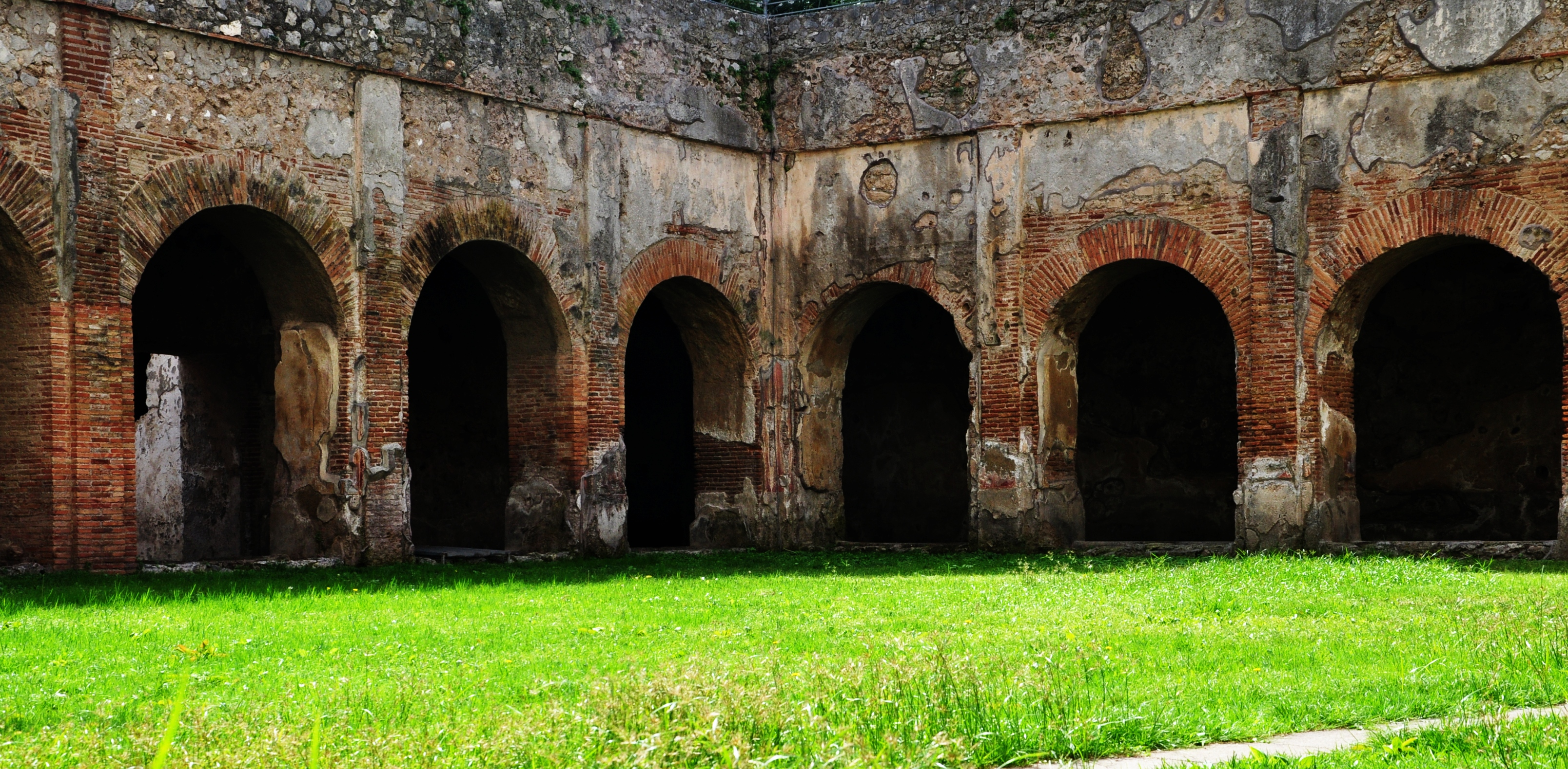 Villa romana di Minori - MIBAC This is a photo of a monument which is part of cultural heritage of Italy.